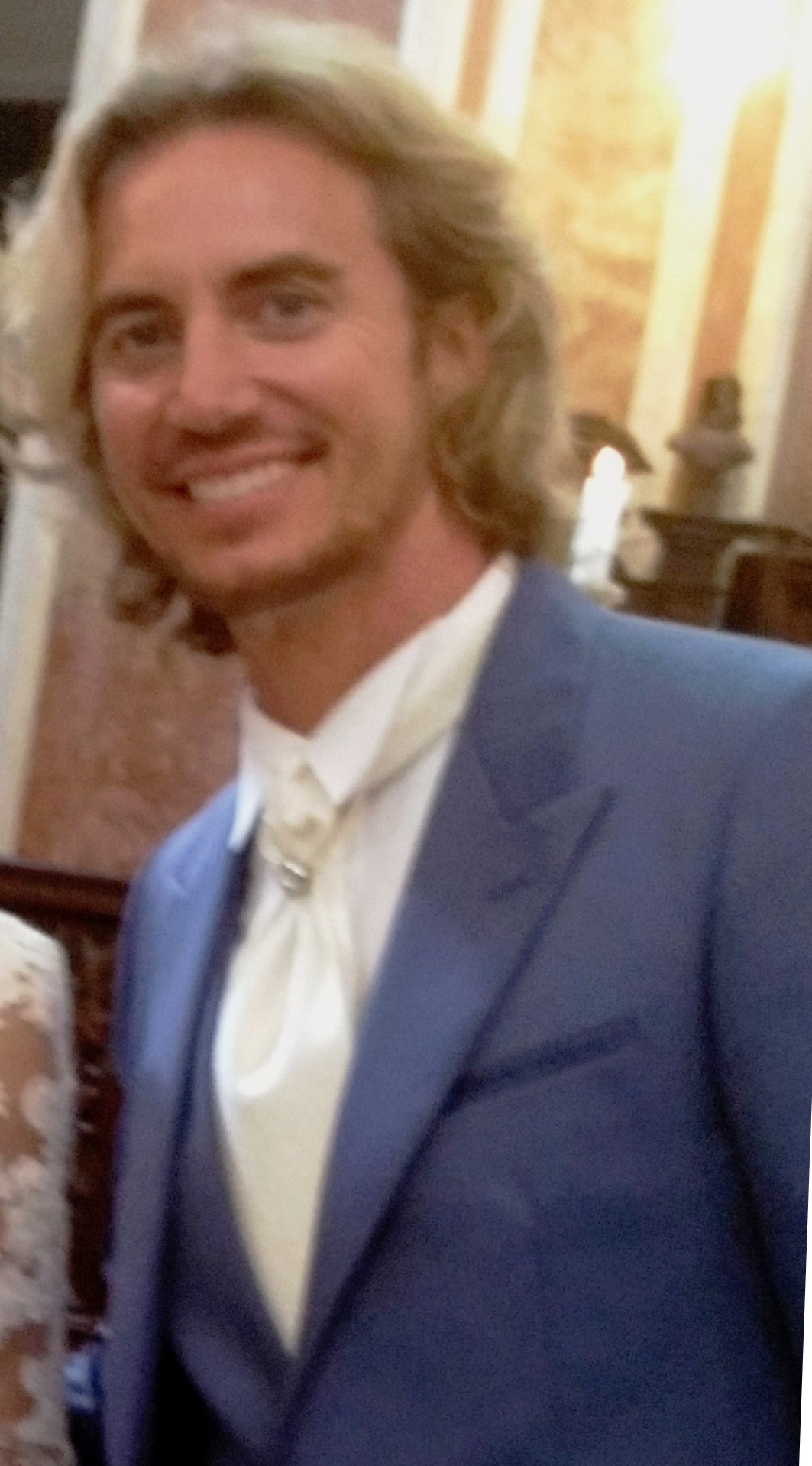 Riccardo Sardonè